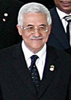 Mahmud Abás, en la Cumbre de América del Sur y países árabes.